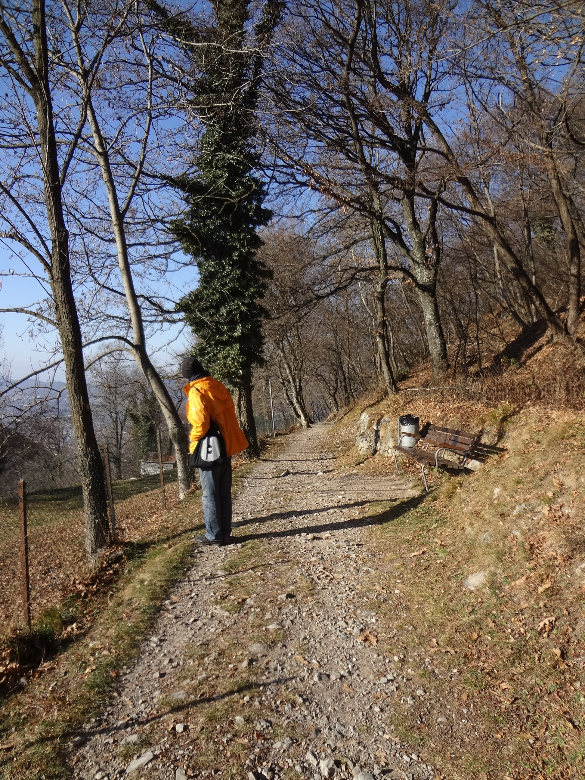 Sentiers allant de Brè à Cureggia